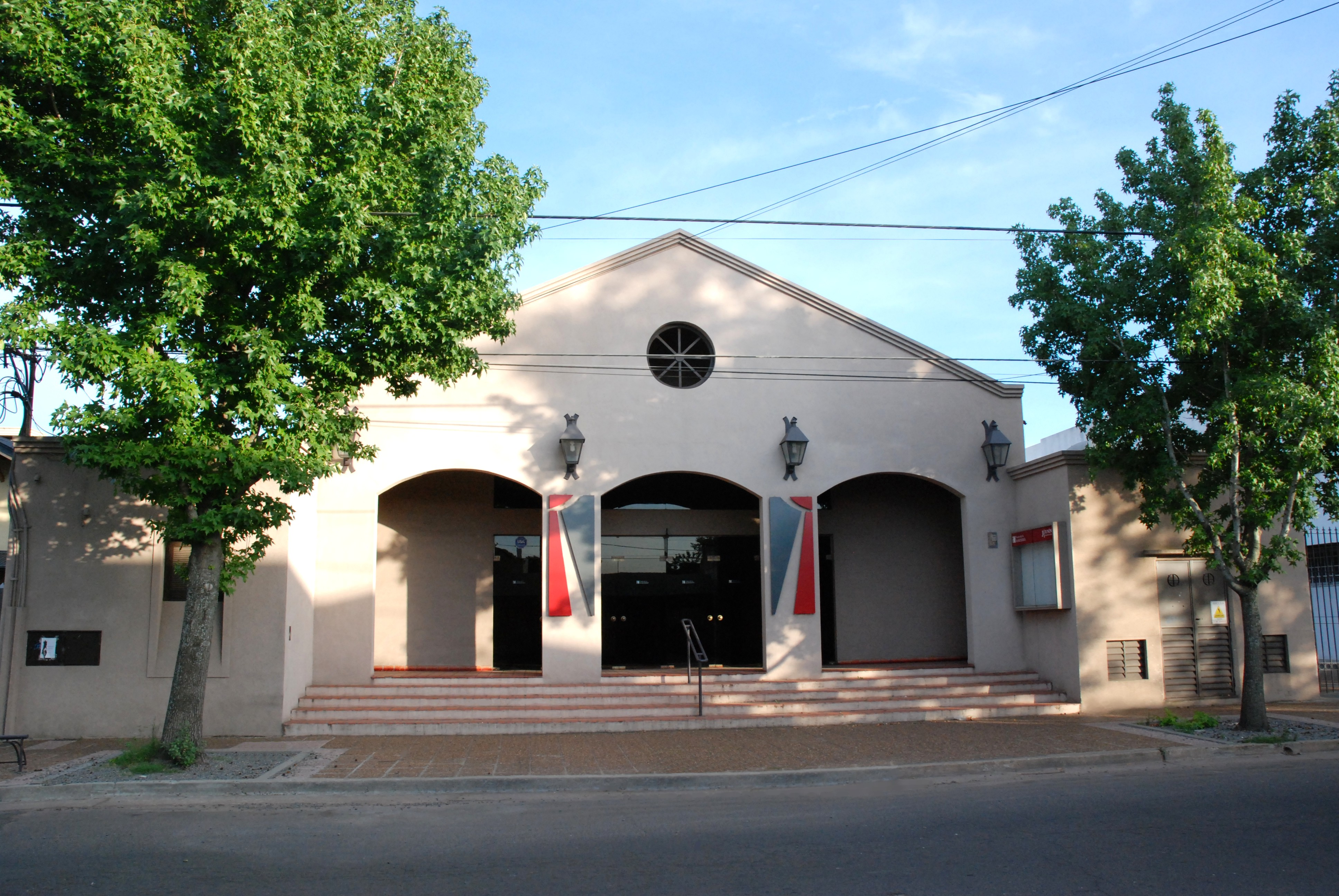 Teatro de la Ranchería. Junín, Argentina.